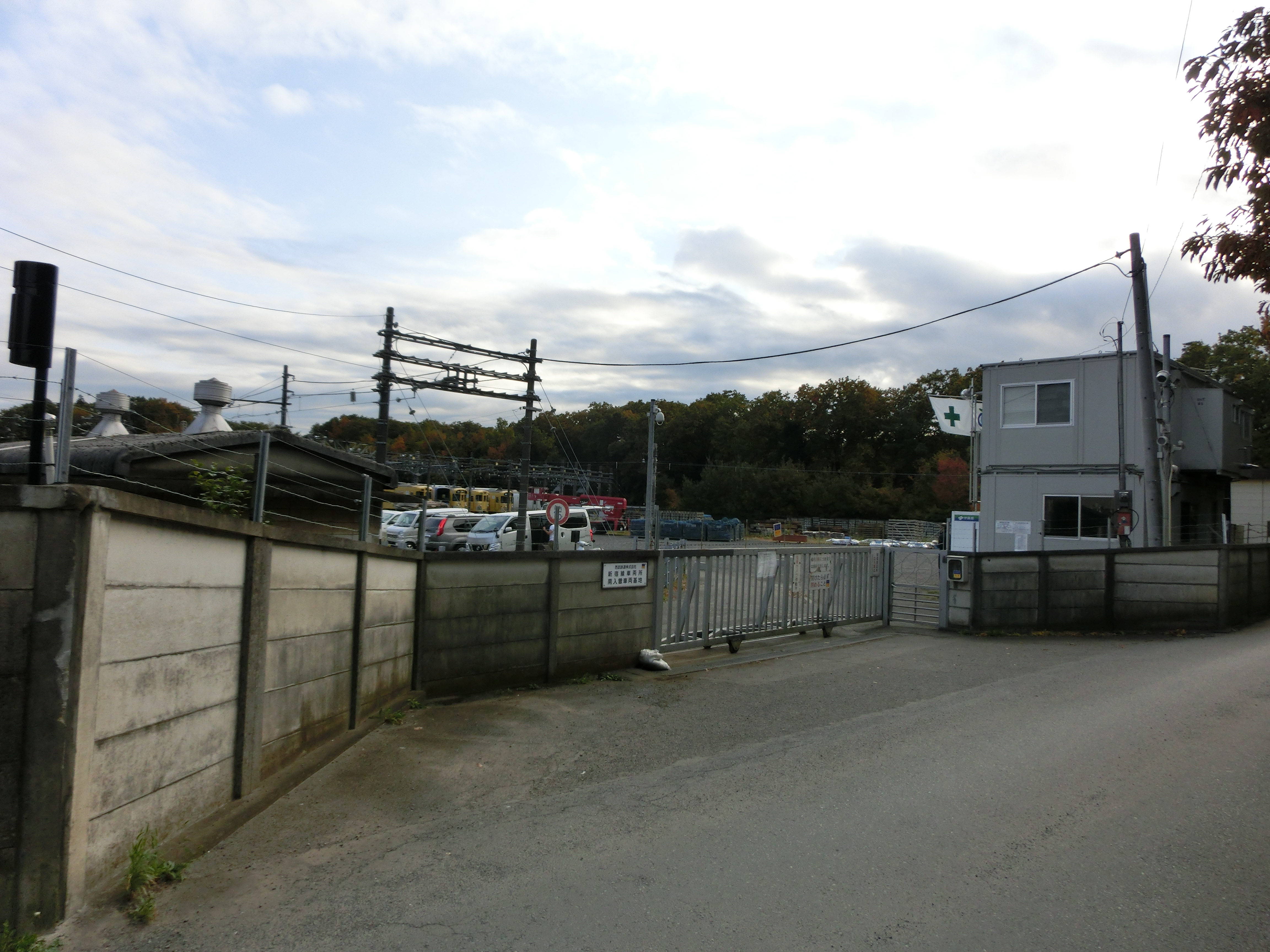 南入曽車両基地における門と停車中の鉄道車両